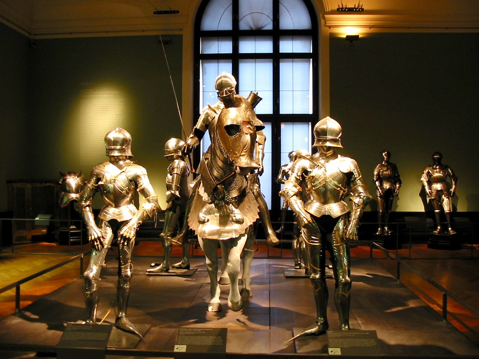 Turnierrüstungen, Pferderüstung